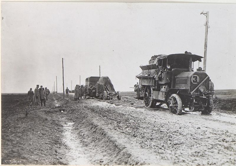 Herausziehen eines Mörserwagens mittels Zugwagens und Kette Podhajce